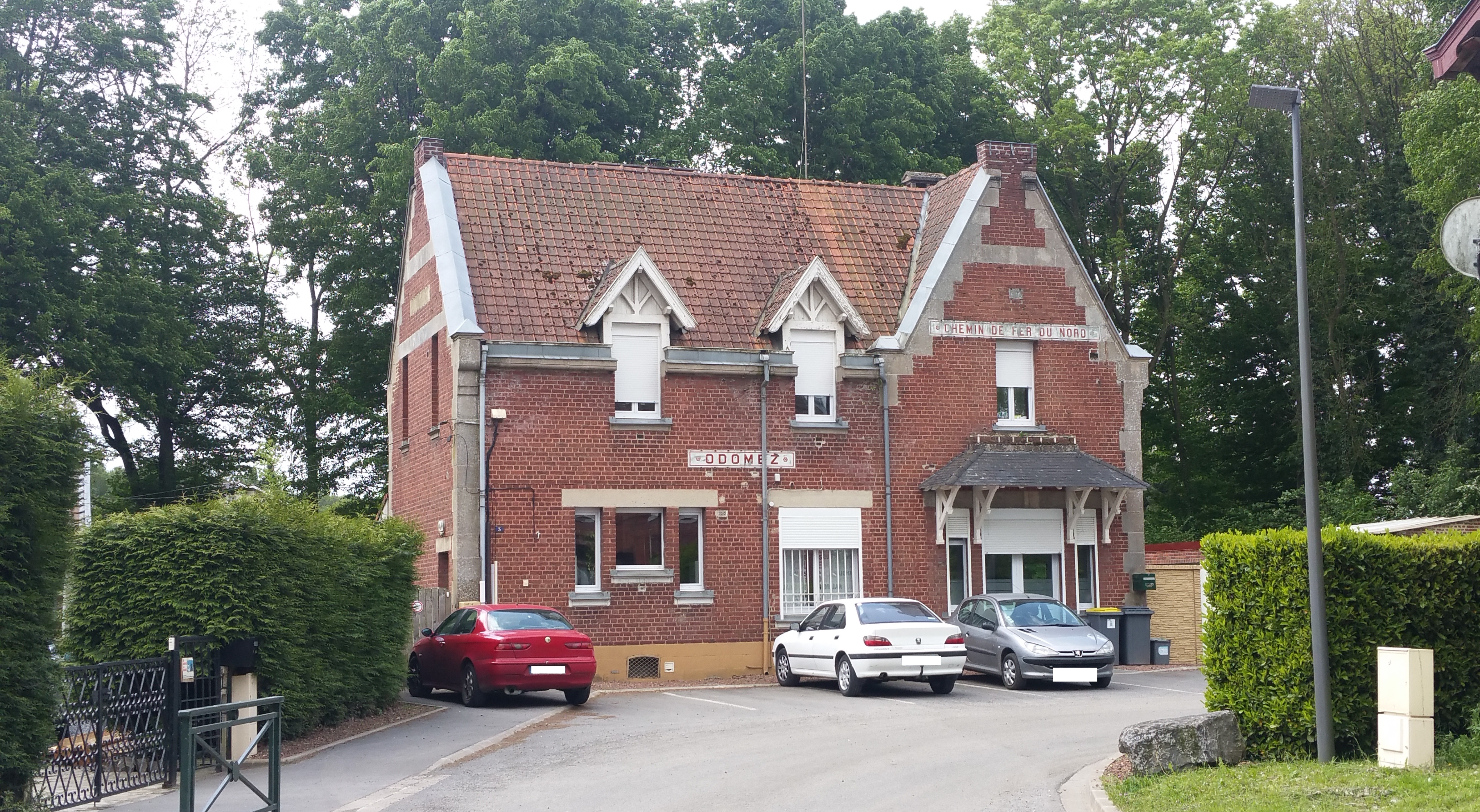 Vue de l'ancienne gare d'Odomez.